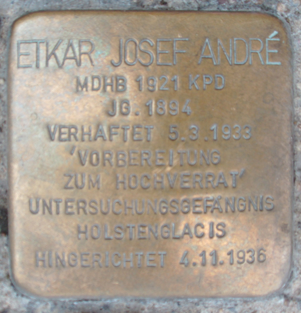 Stolperstein für Etkar Josef André